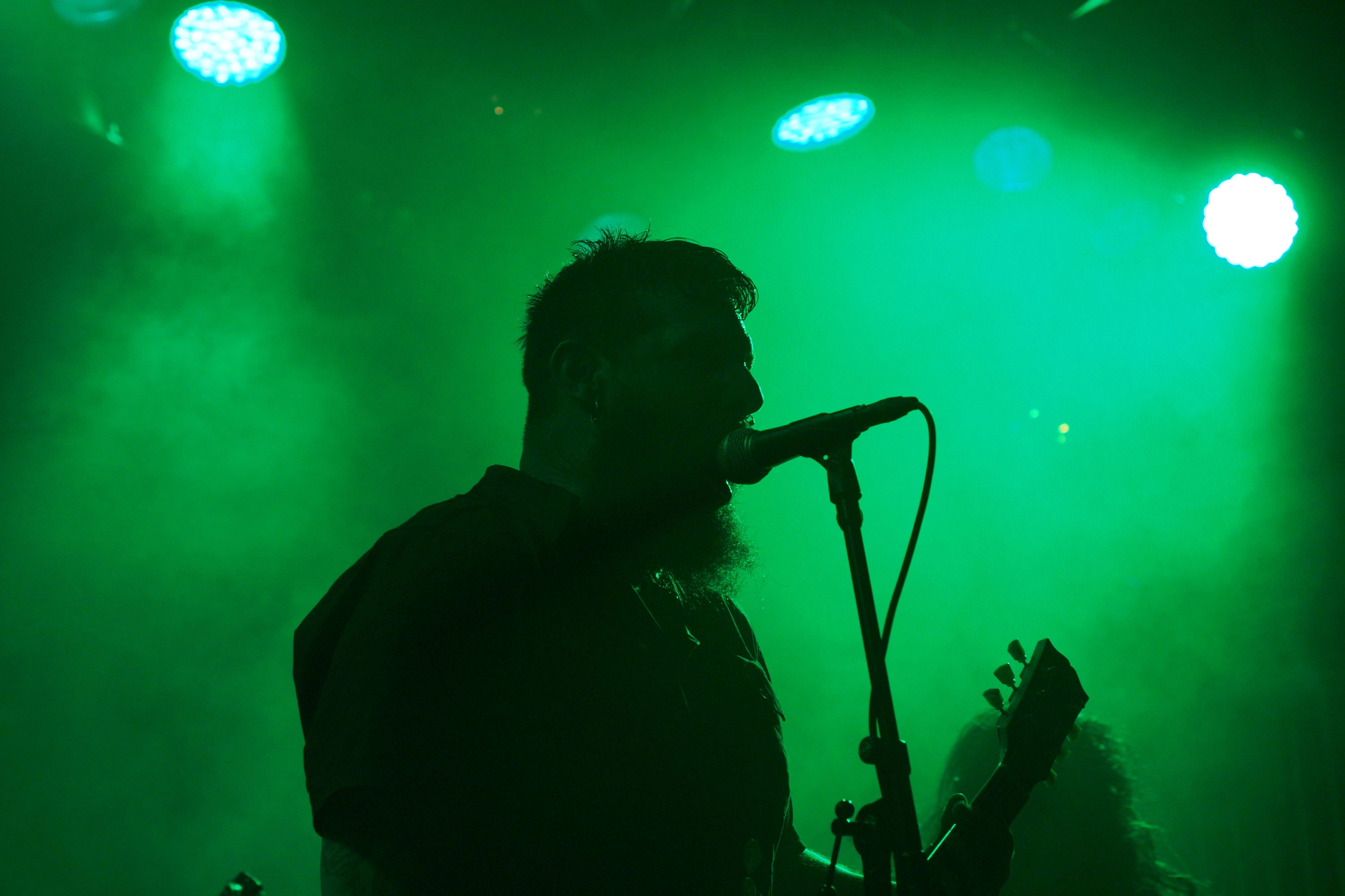 Bison B.C. 7 june 2013